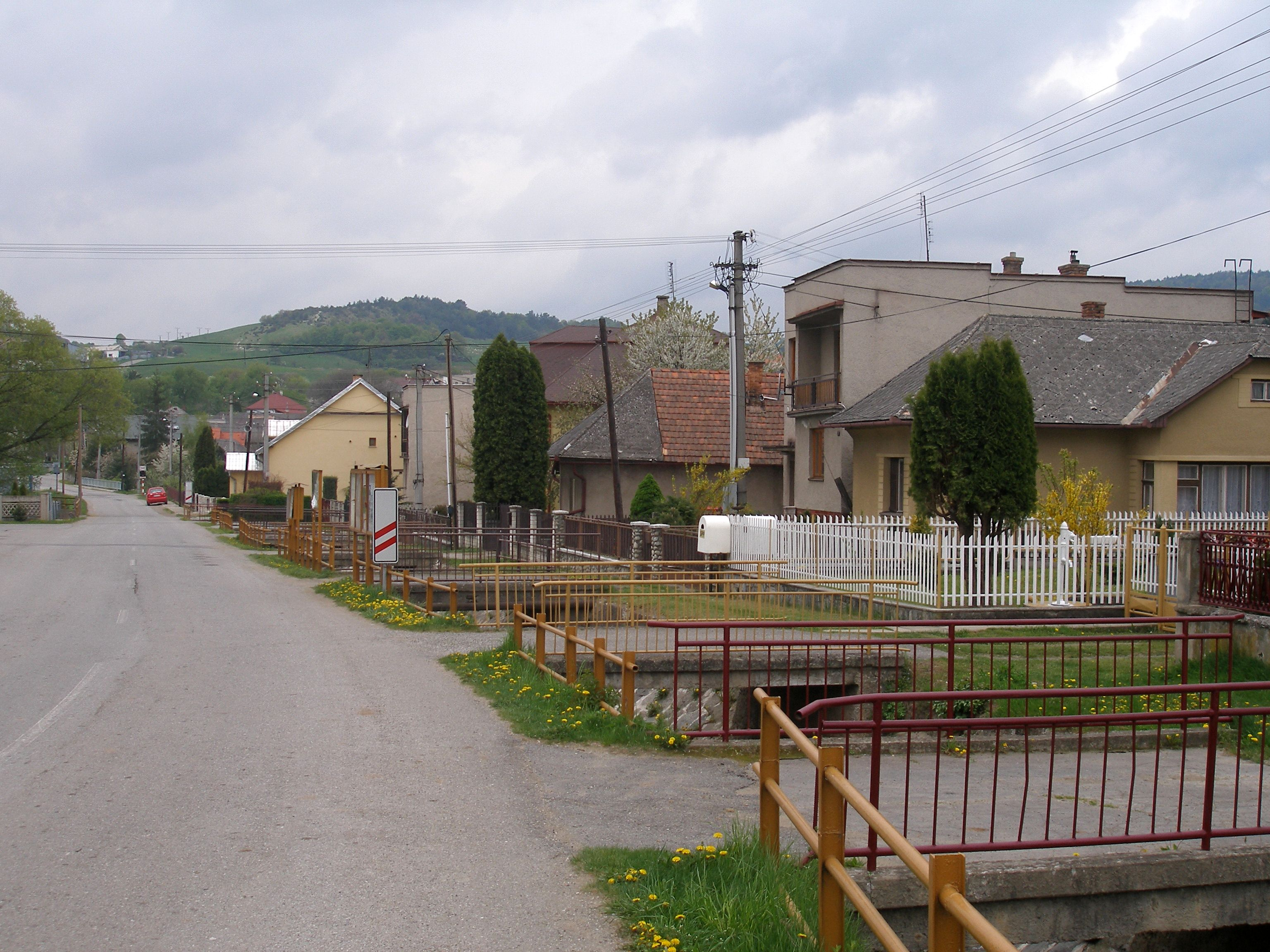 Obec Demjata okres Prešov región Šariš